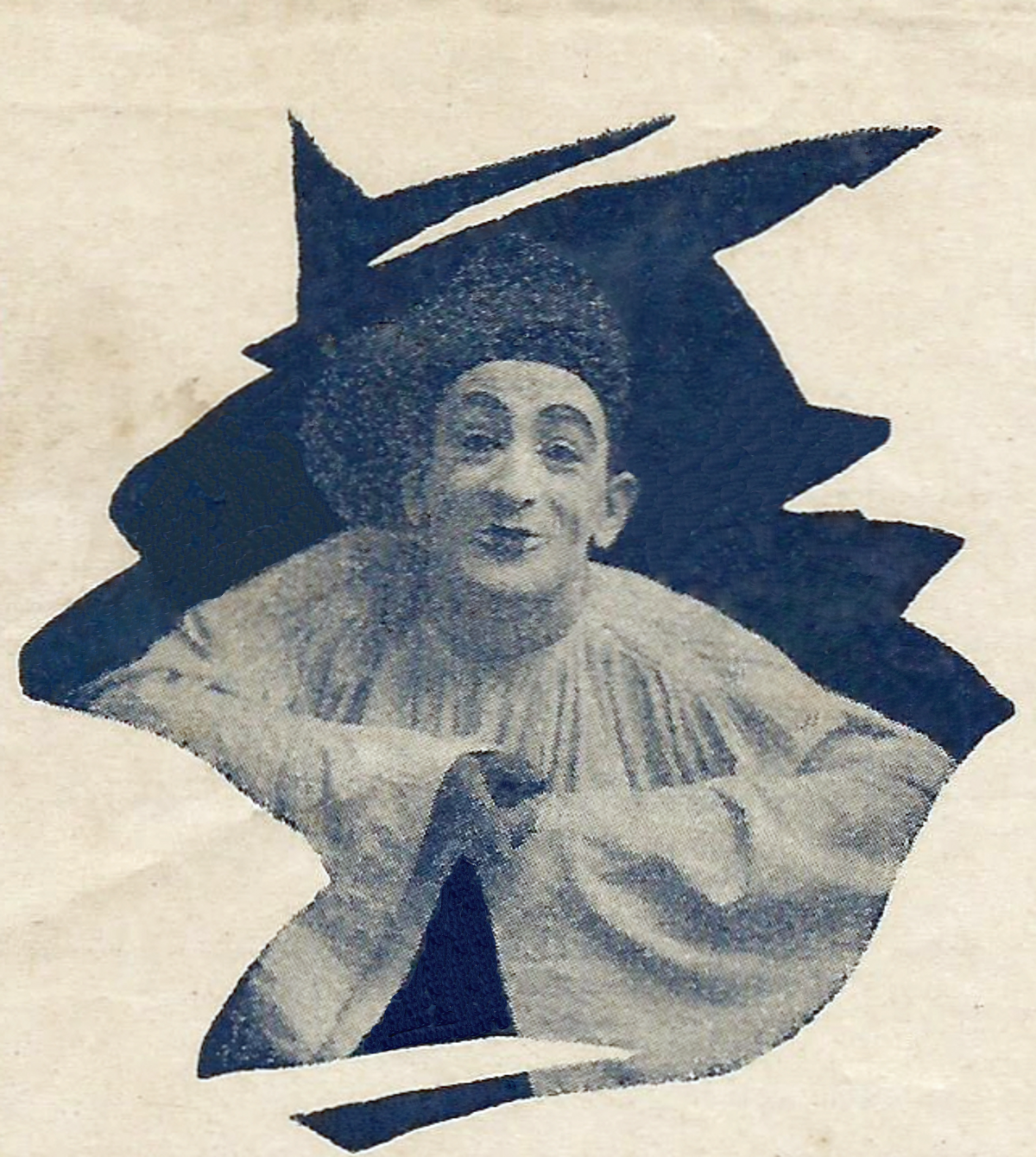 Bonaventura Ibáñez caracterizado como Pierrot